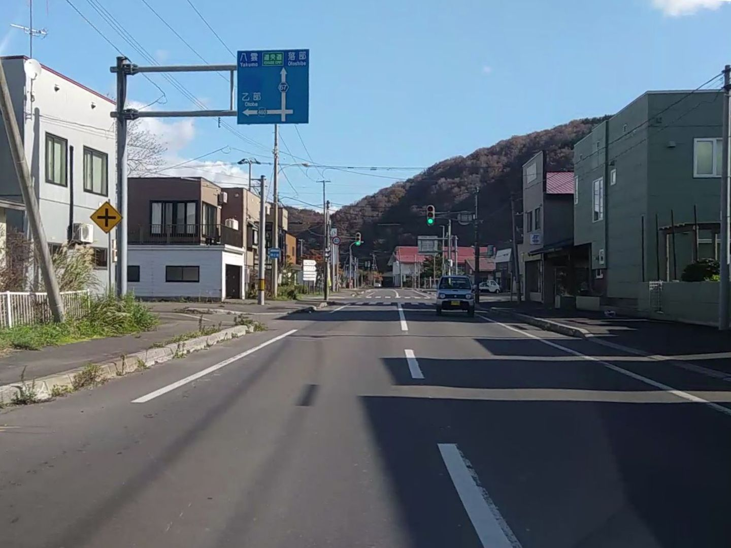 北海道道67号八雲厚沢部線・北海道道460号乙部厚沢部線交点-1（終点側から、2018年11月撮影）